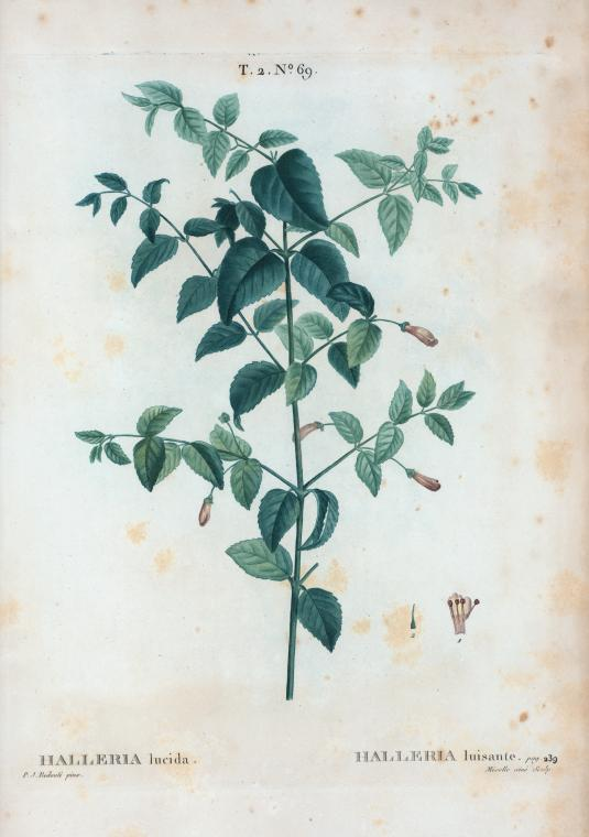 Halleria lucida = Halleria luisante.